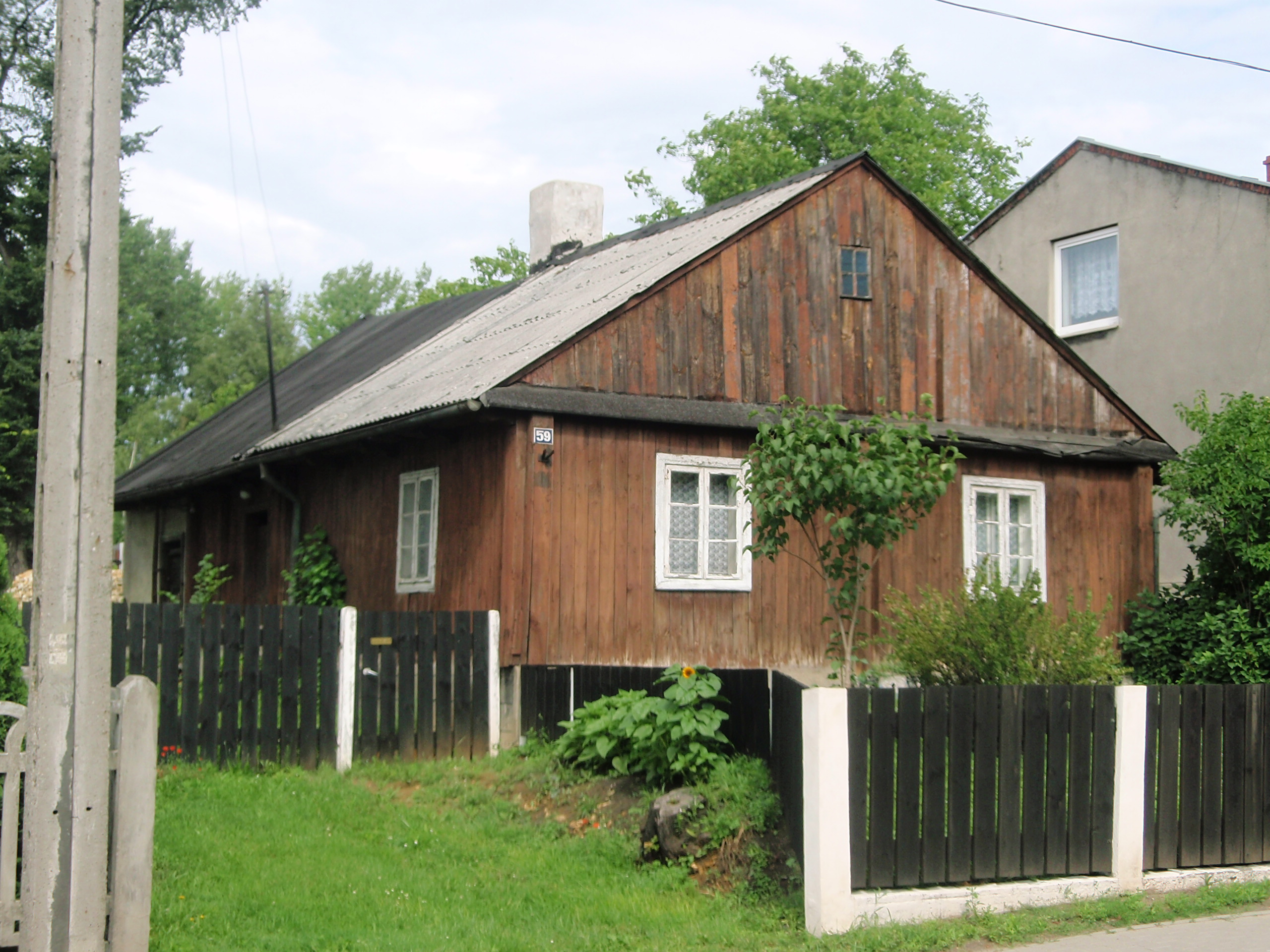 Dom w Bobrownikach (woj. śląskie) przy ul. 1-go maja.